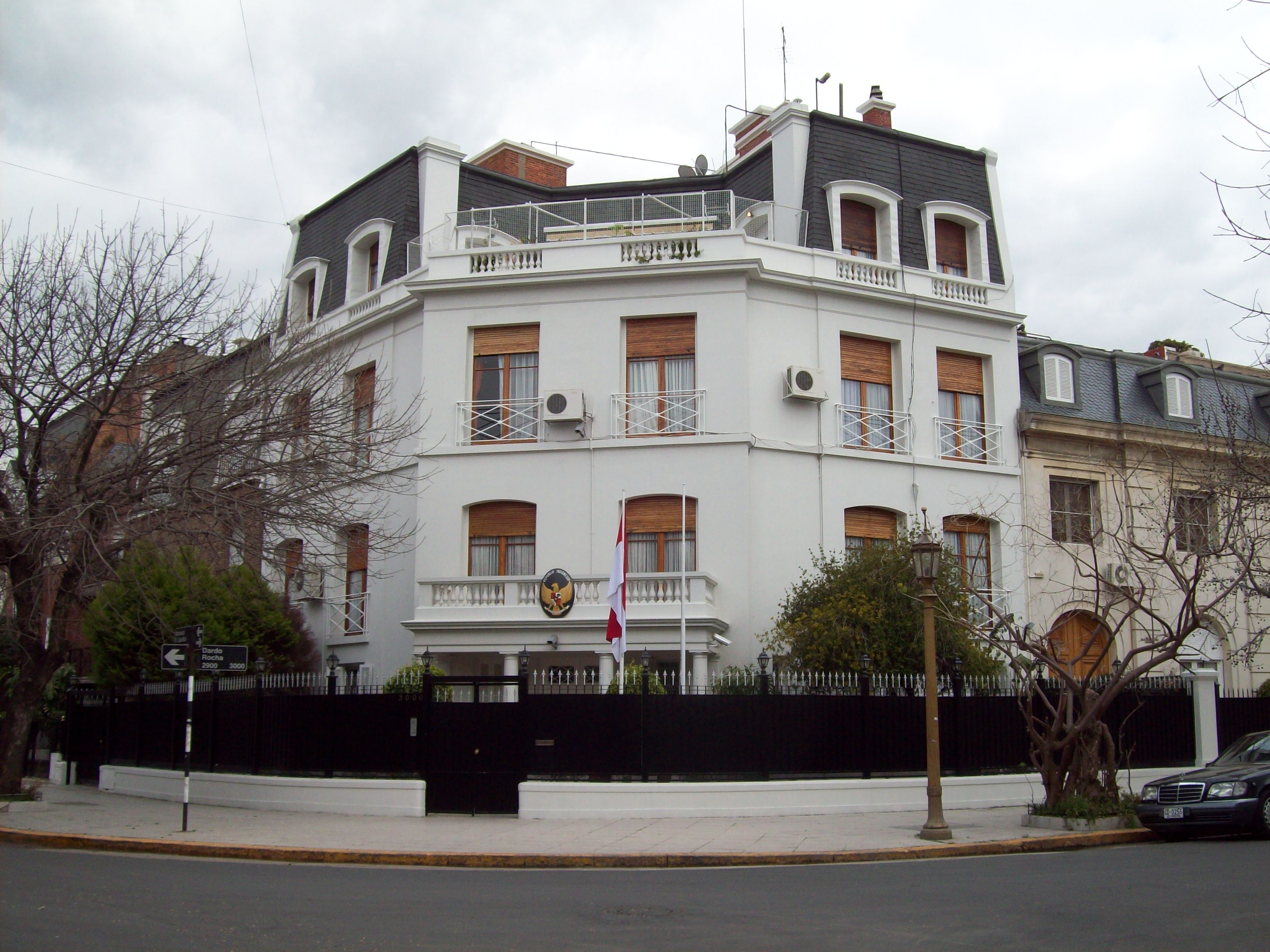 Embajada de Indonesia en Palermo, Buenos Aires.